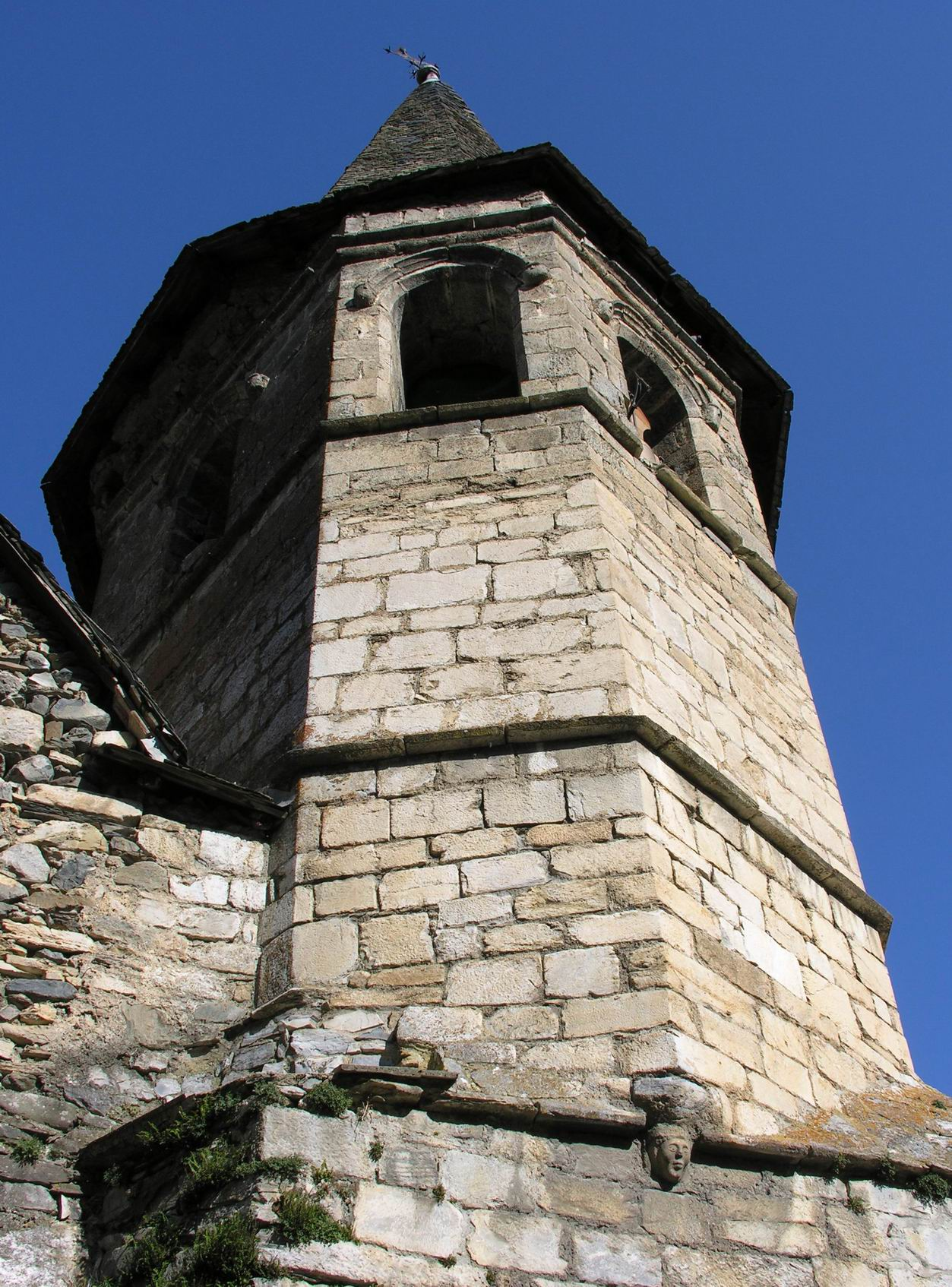 Sant Martí de Gausac, Val d'Aran